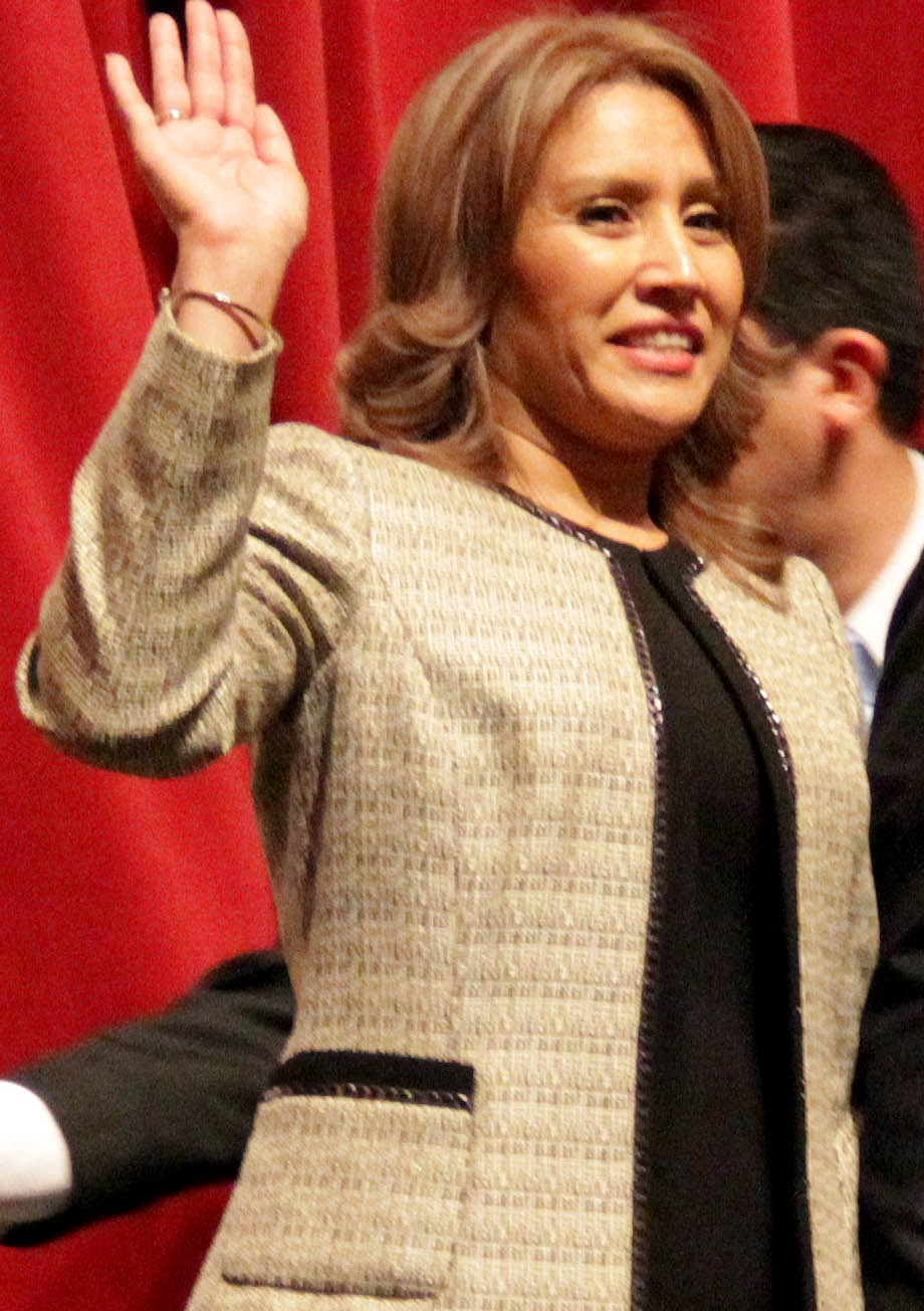 Hilda Patricia Marroquin Argueta de Morales